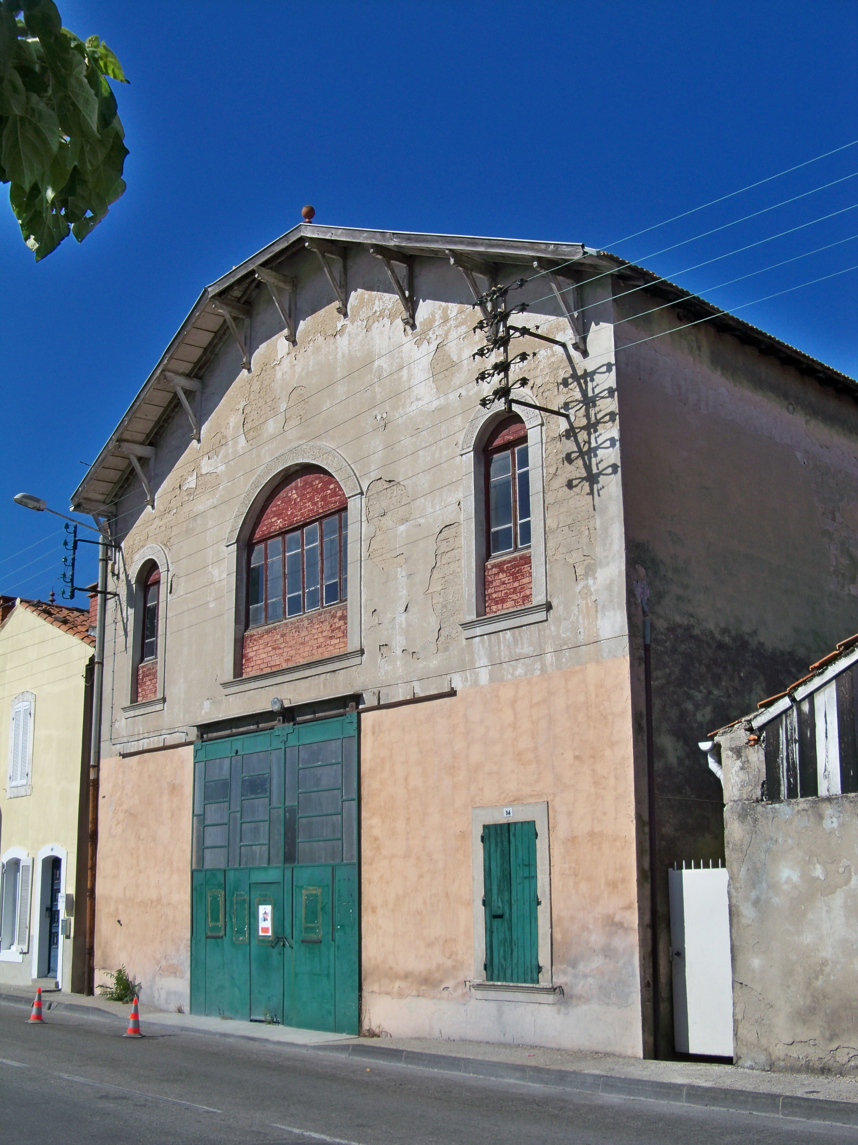 Graineterie Roux de Carpentras, Vaucluse : inscrit aux monuments historiques depuis Septembre 2005